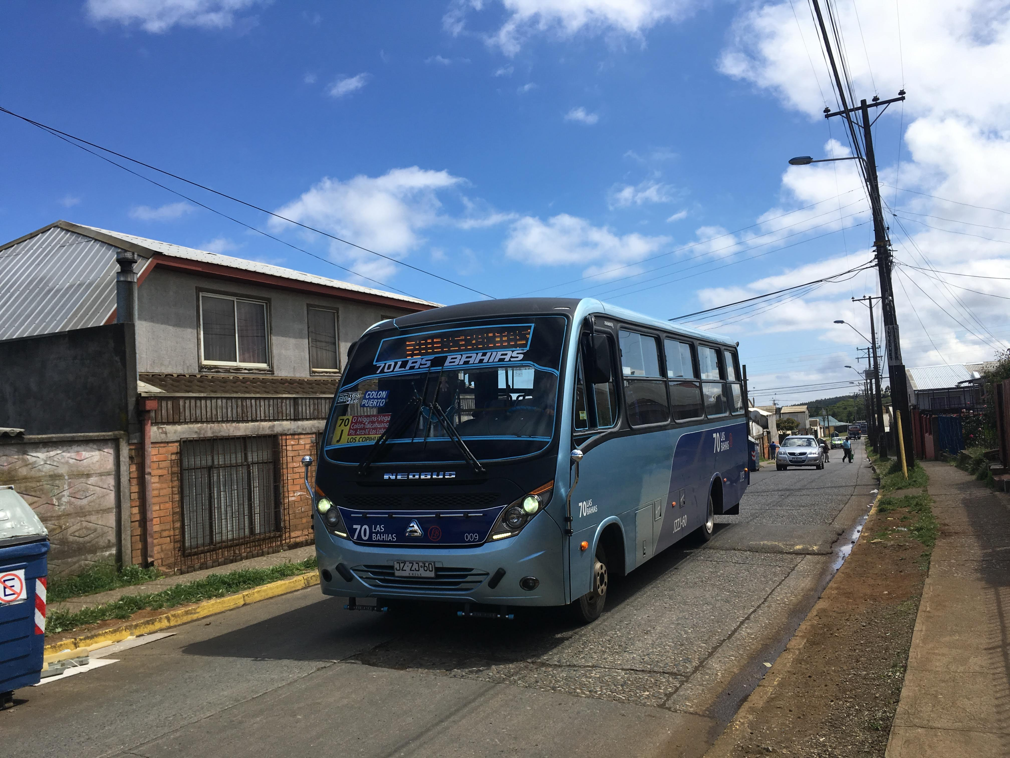 Neobus +Thunder